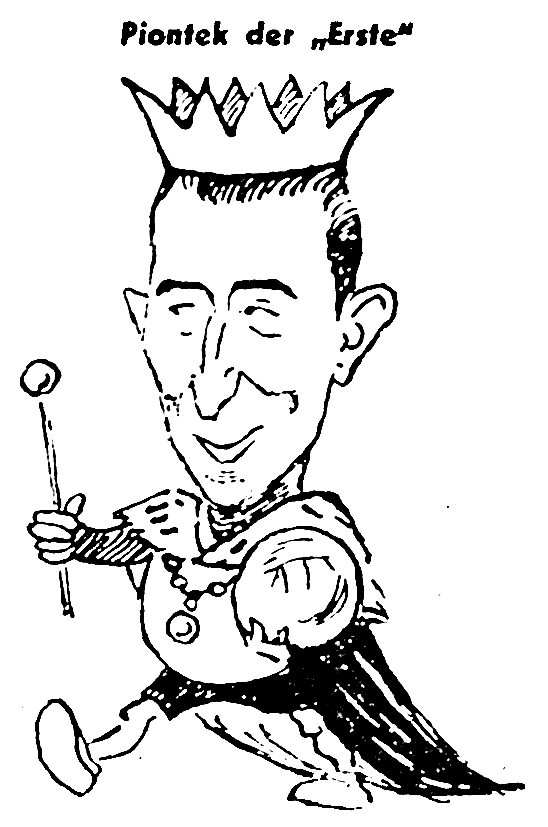 Karikatur von Leonard Piontek (1913-1967), polnischer Fußballspieler, deutscher Herkunft.